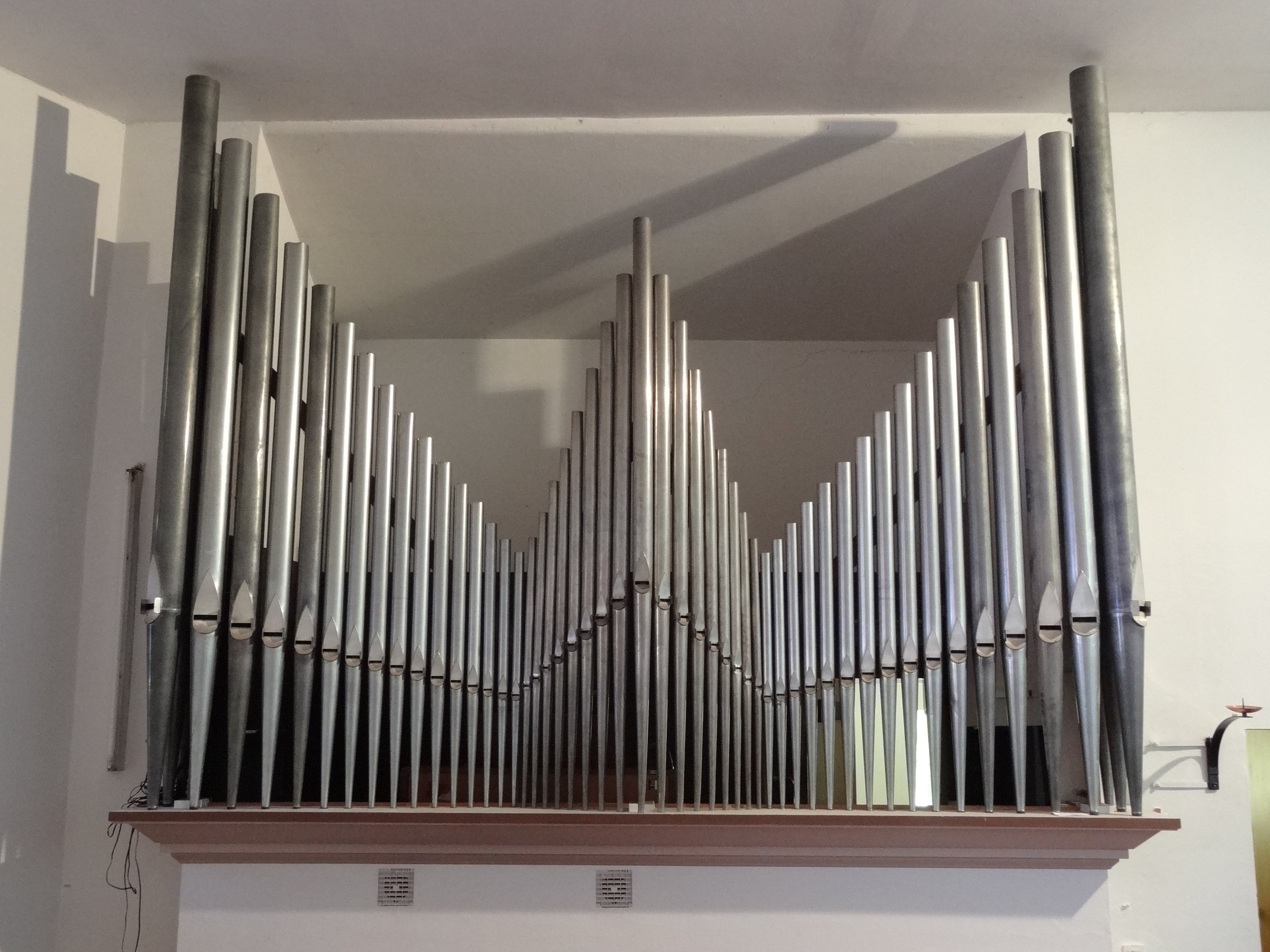 Alte Kirche (Watzenborn-Steinberg)